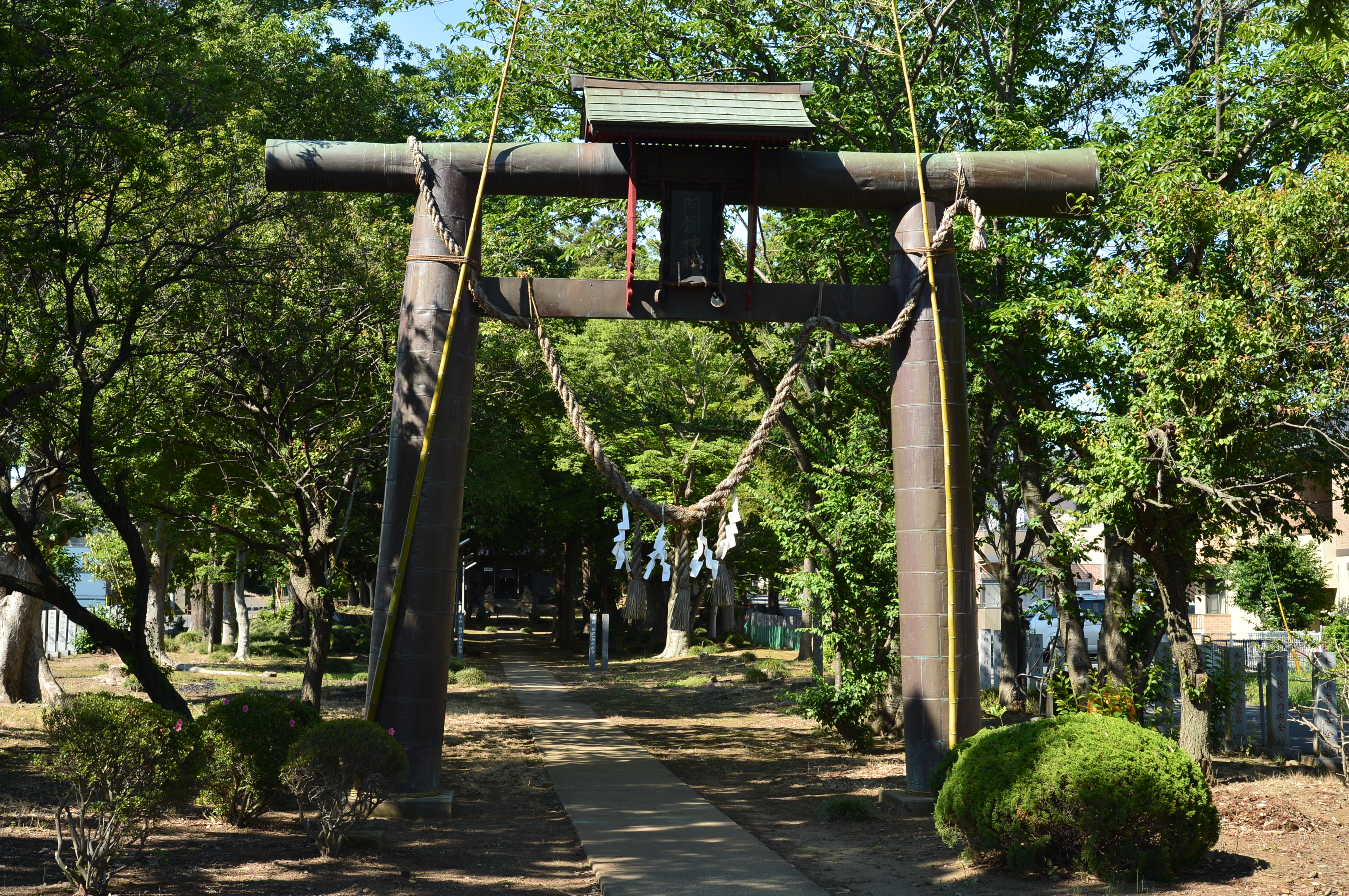 阿彌神社の鳥居（茨城県稲敷郡阿見町中郷）